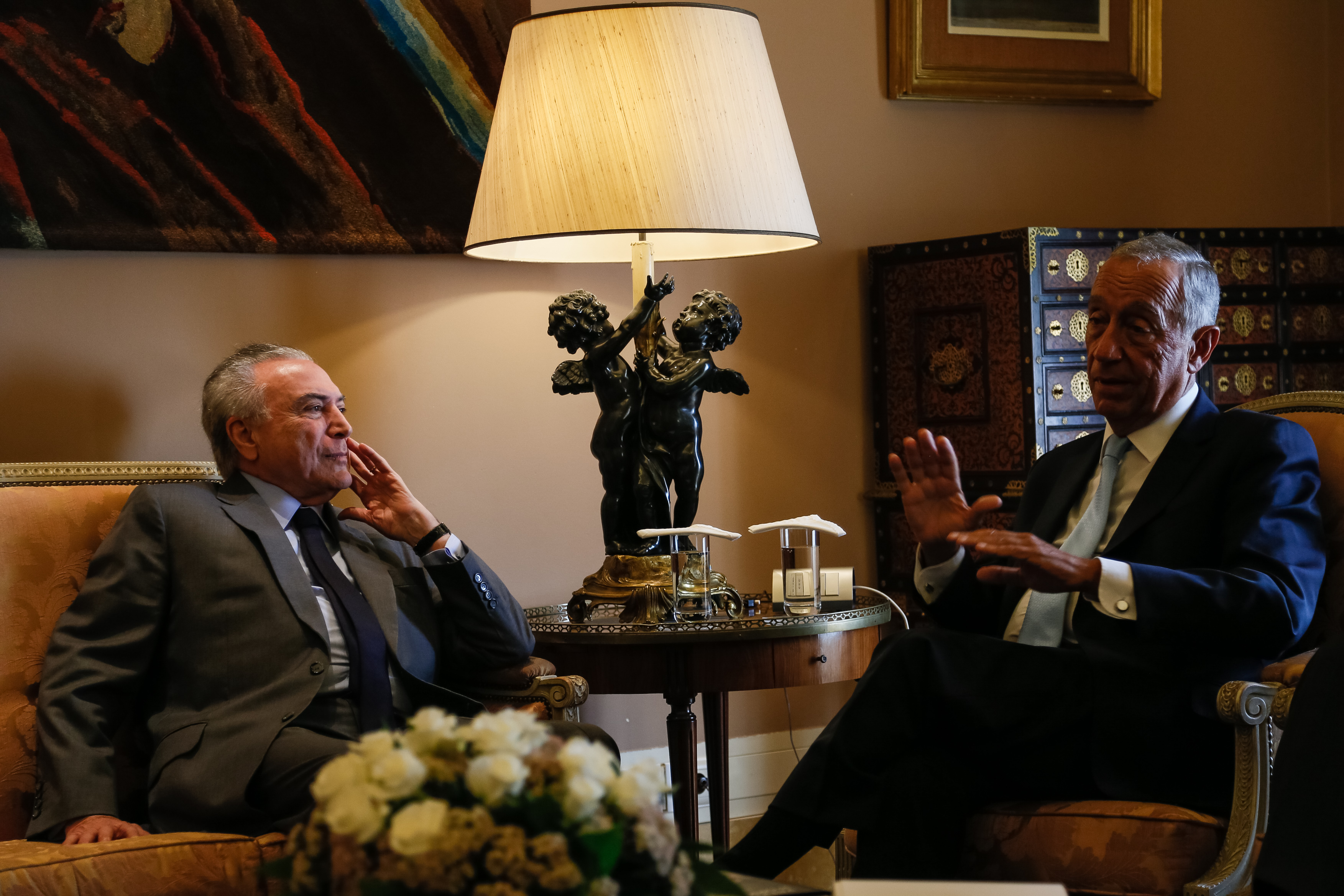 (Lisboa - Portugal, 30/08/2017) Encontro com Presidente da República Portuguesa, Marcelo Rebelo de Sousa.